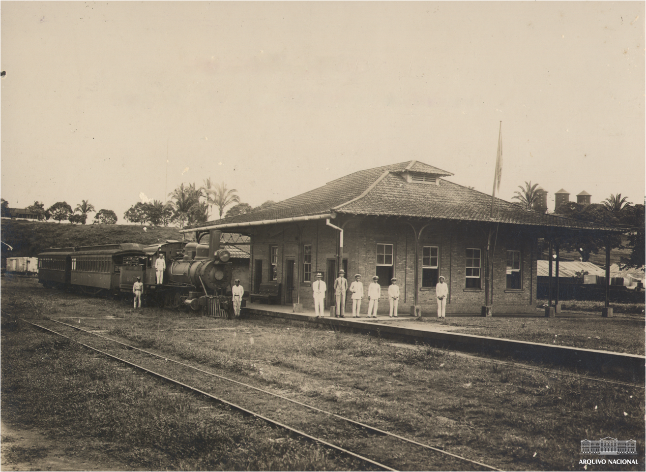 Estação inicial da Ferrovia Madeira-Mamoré, Porto Velho. Fundo documental: Correio da Manhã